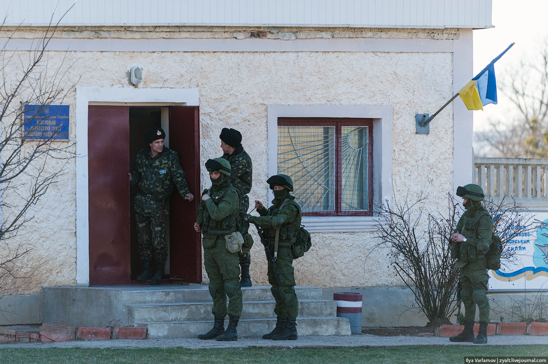 Крым, Варламов, март 2013